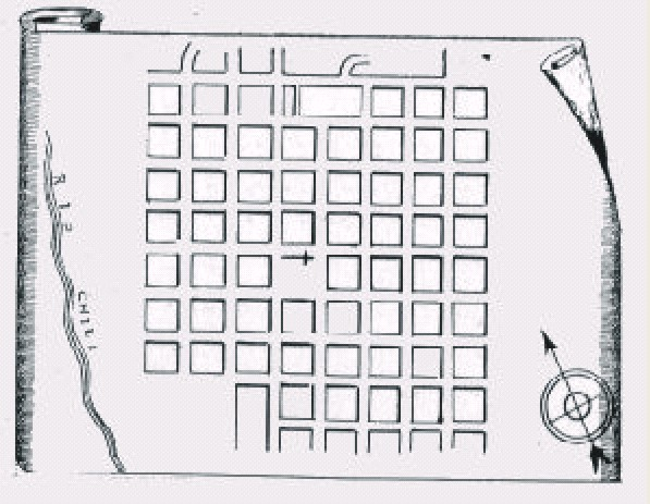 Trazado del primer plano de Arequipa